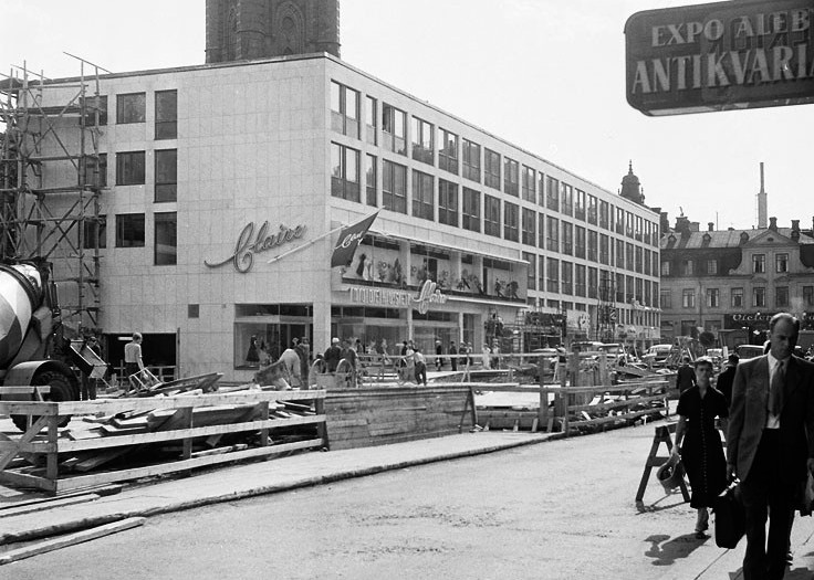 Kvarteret Orgelpipan med Modehuset Claire